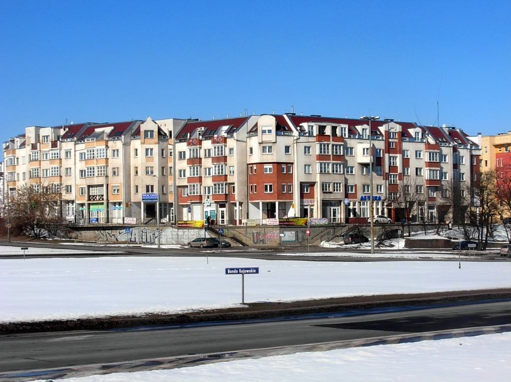 Zabudowa na osiedlu Szwederowo w Bydgoszczy